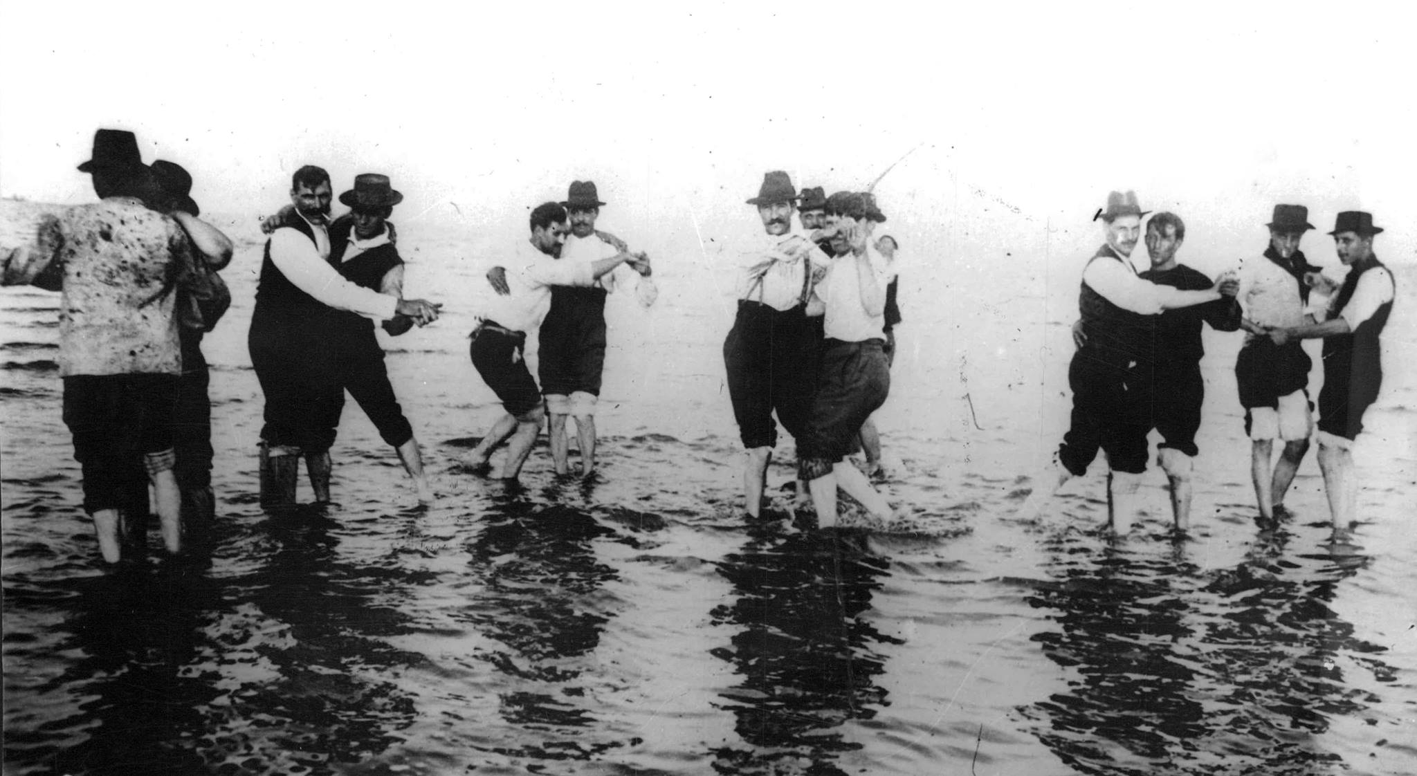 Buenos Aires. Hombres bailando tango en el río. 1904 Documento Fotográfico. Inventario 22069. Archivo General de la Nación Argentina